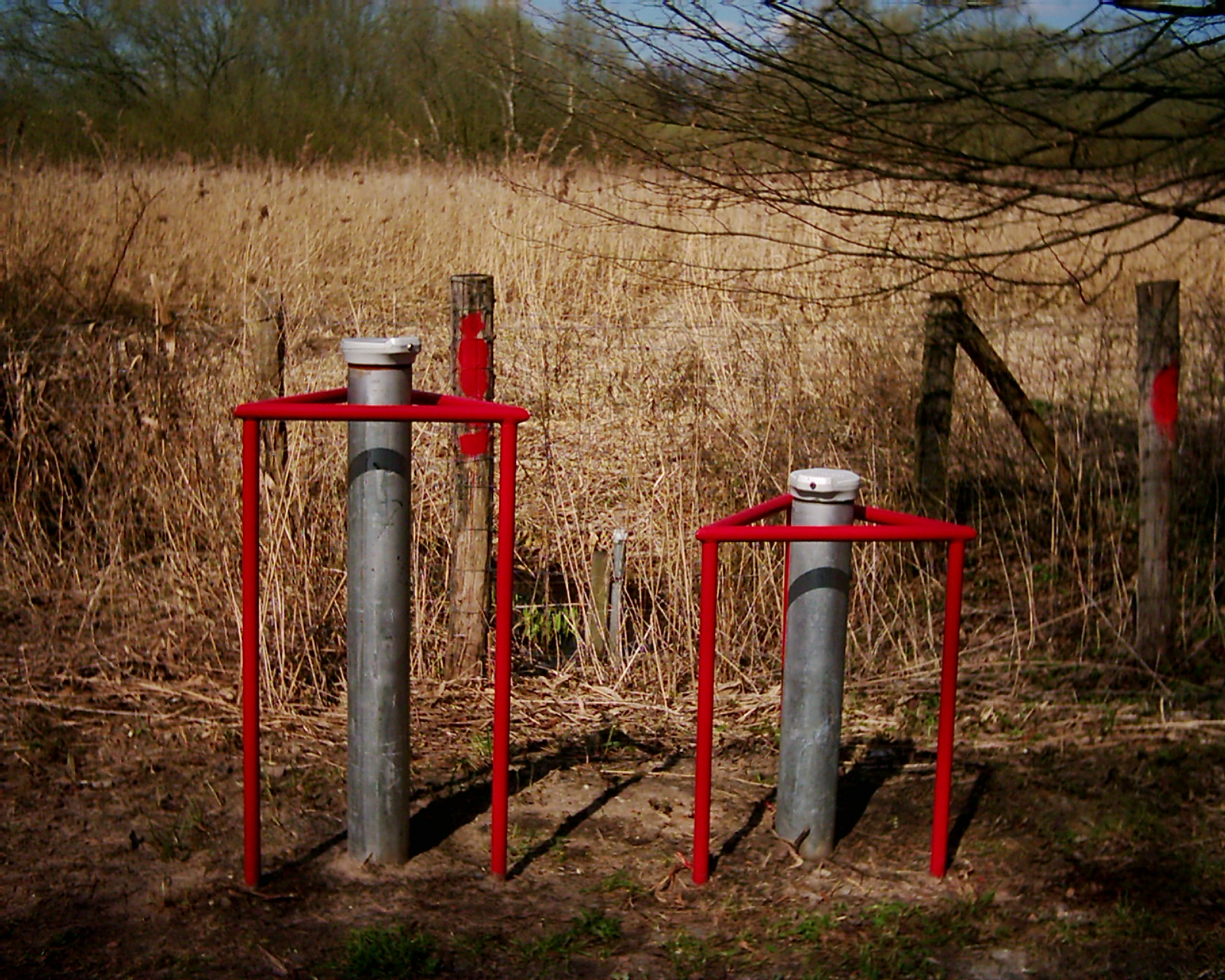 Das Naturschutzgebiet Karower Teiche wird am Ablauf des Schilfteiches und des Durchflusses zur Panke mit 3 Pegelständen von der Naturschutzbehörde überwacht. Der Abfluss erfolgt nicht als Kanal sondern als fast niveaugleiches Schichtwasser.